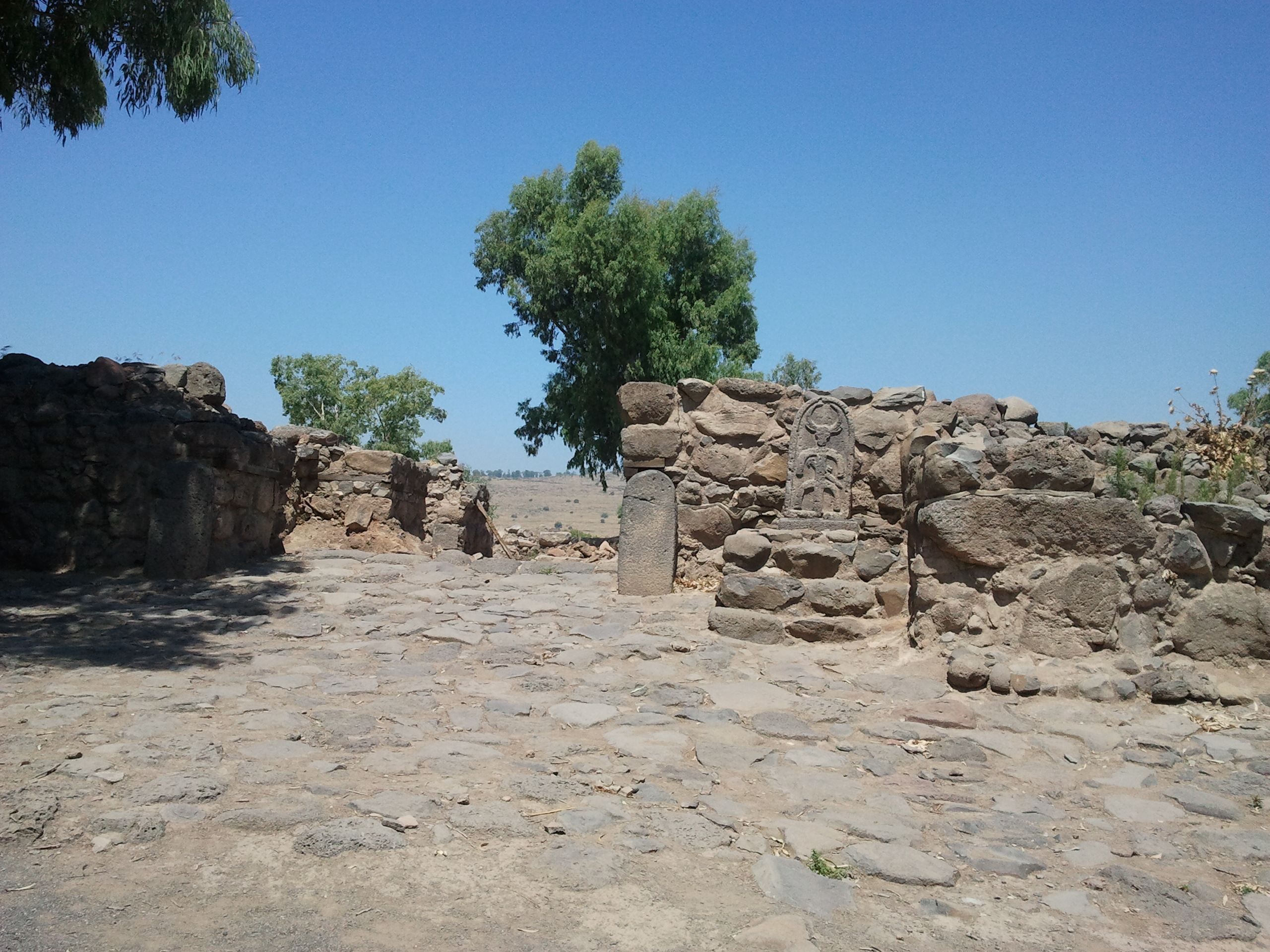 Ruins of fishing village Bethsaida meantiond in New Testament of Bible, northern from Sea of Galilee, Israel תל בית ציְדה הנמצא בבקעת בית צידה בצפון-מזרחה של הכנרת התגלו שרידים של עיר עתיקה בשם זה ששכנה במקום. הבקעה קרויה על שם העיר. כלי תל אל יהודיה הינה קבוצת כלי קרמיקה ייחודית מתקופת הברונזה התיכונה II מוזיאון רוקפלר פכיות שער העיר